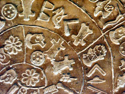 Motiv: Diskos von Phaistos, Detail Fotografiert am: 11-Aug-2004 Ort: Archäologisches Museum, Heraklion, Kreta, Griechenland Fotograf: asb Kamera: Minolta Dimage 7 Hi Lizenz: GNU FDL 19:45, 17. Aug 2004 Asb 400 x 300 (111264 Byte) (Diskos.von.Phaistos_Detail.1_11-Aug-2004_asb_PICT3372.JPG)